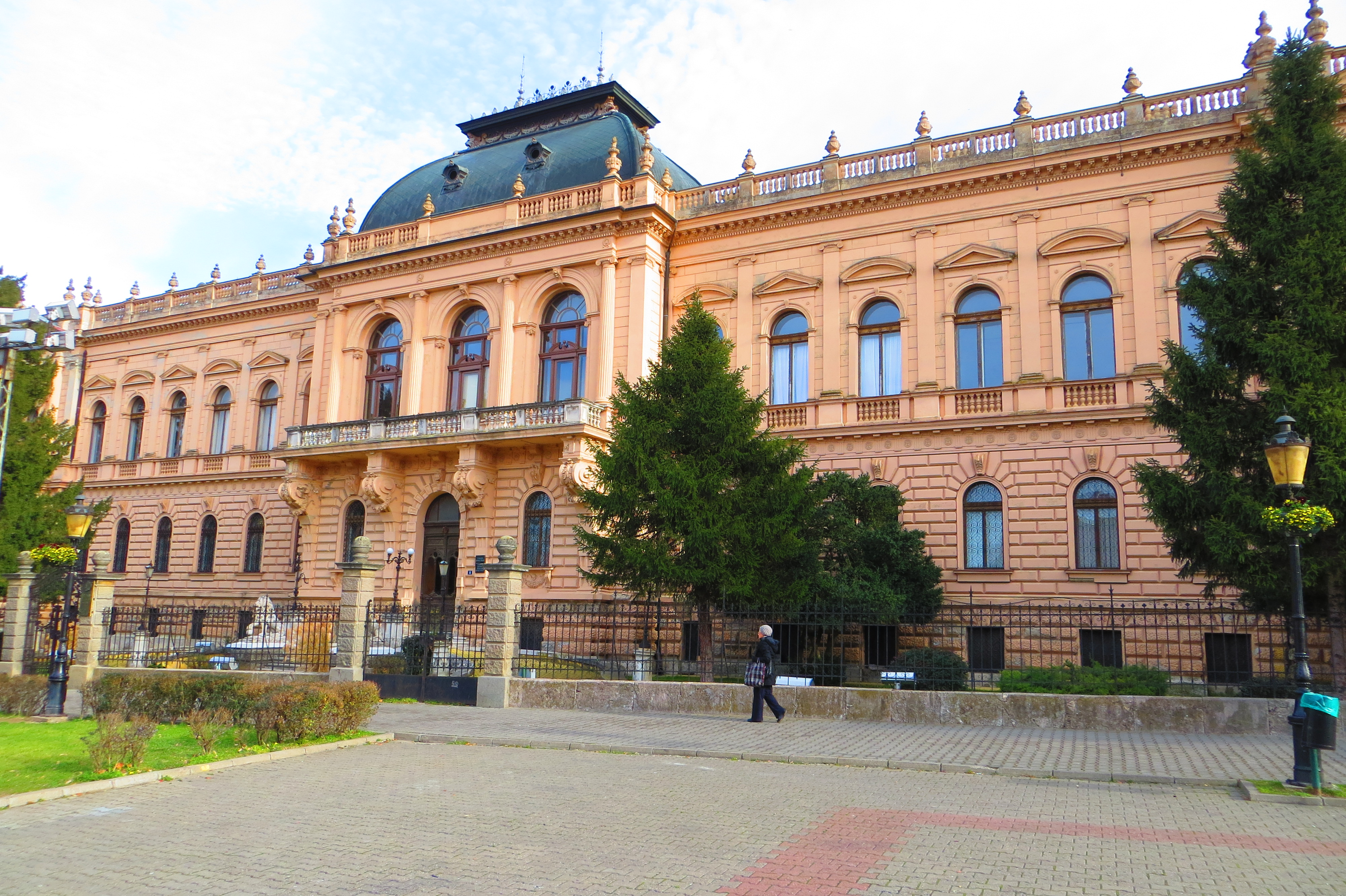 Patrijaršija